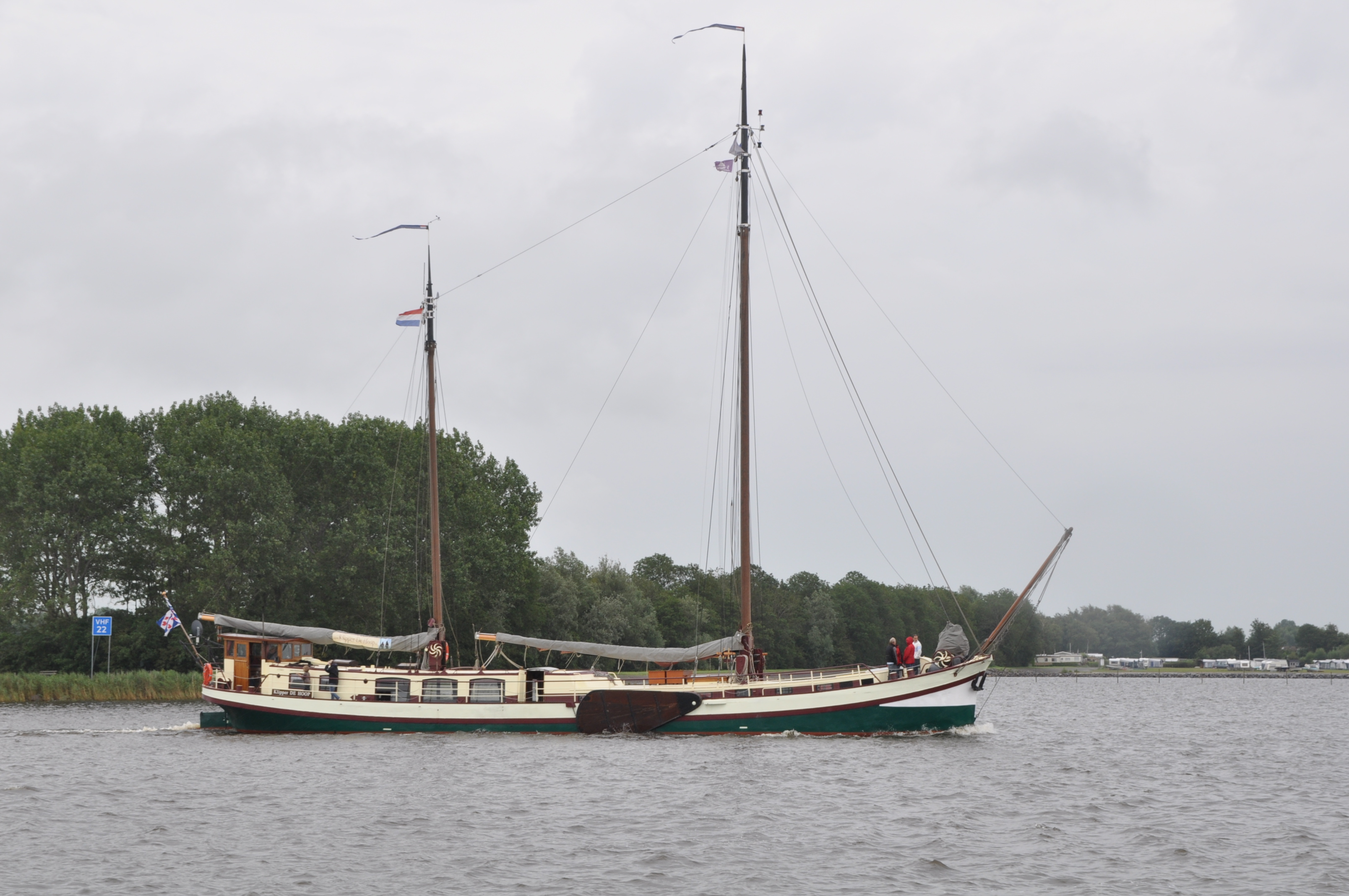 De klipper DE HOOP op de motor in Friesland.